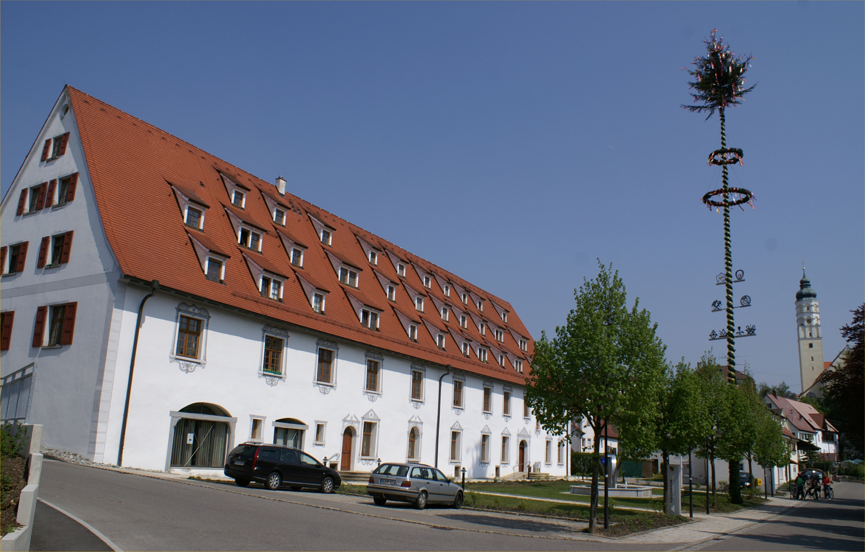 Das Untere Schloss in Öpfingen beherbert heute die Gemeindeverwaltung mit Sitzungssaal und Kulturraum.